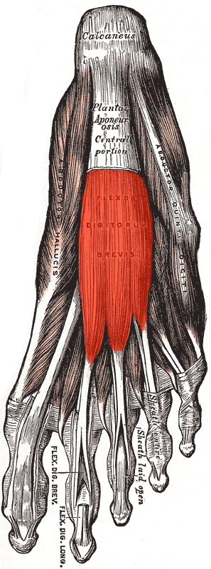 flexor digitorum brevis muscle